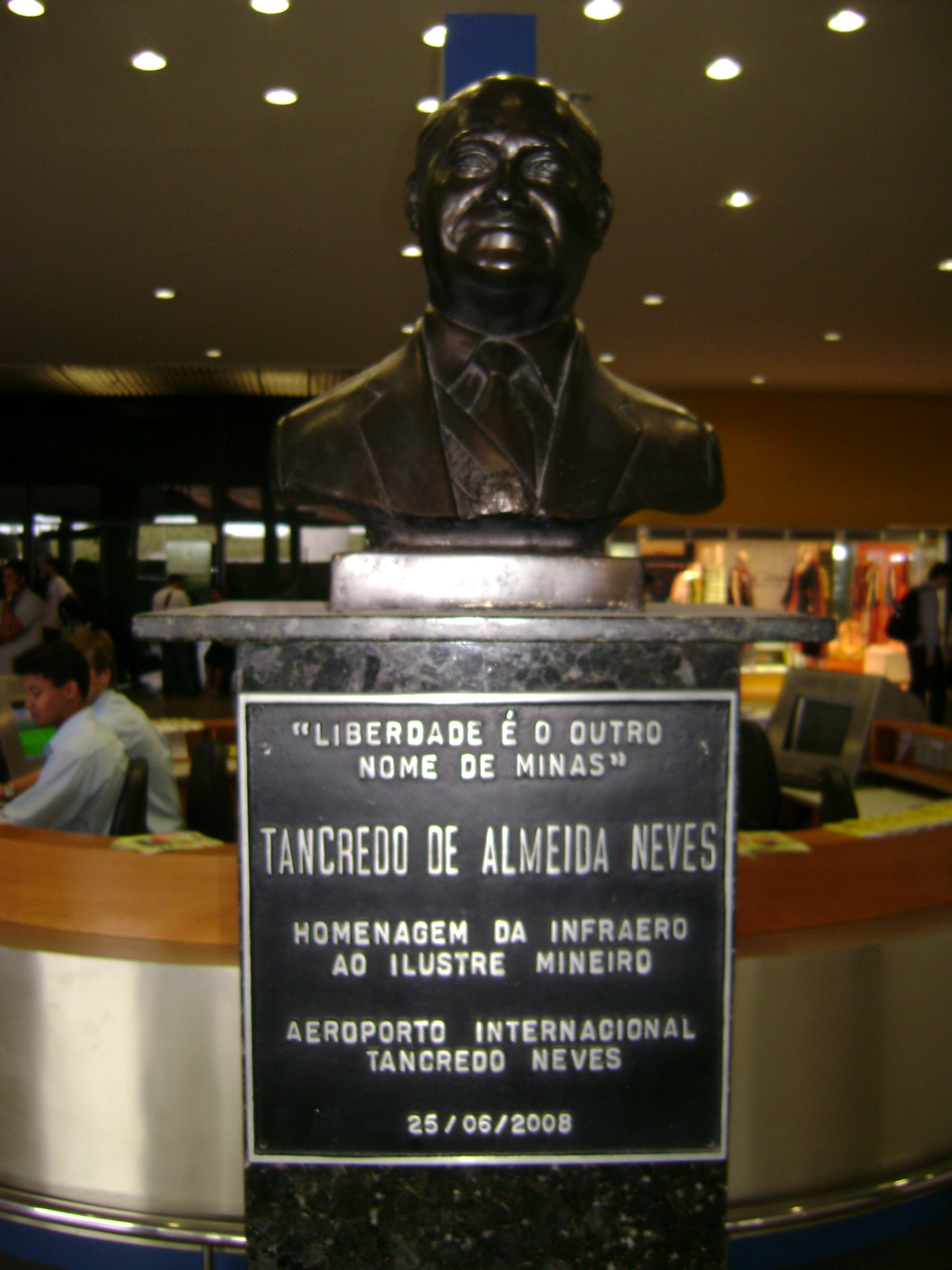 Estátua de Tancredo de Almeida Neves no Aeroporto Internacional de Confins, em Minas Gerais, Brasil.